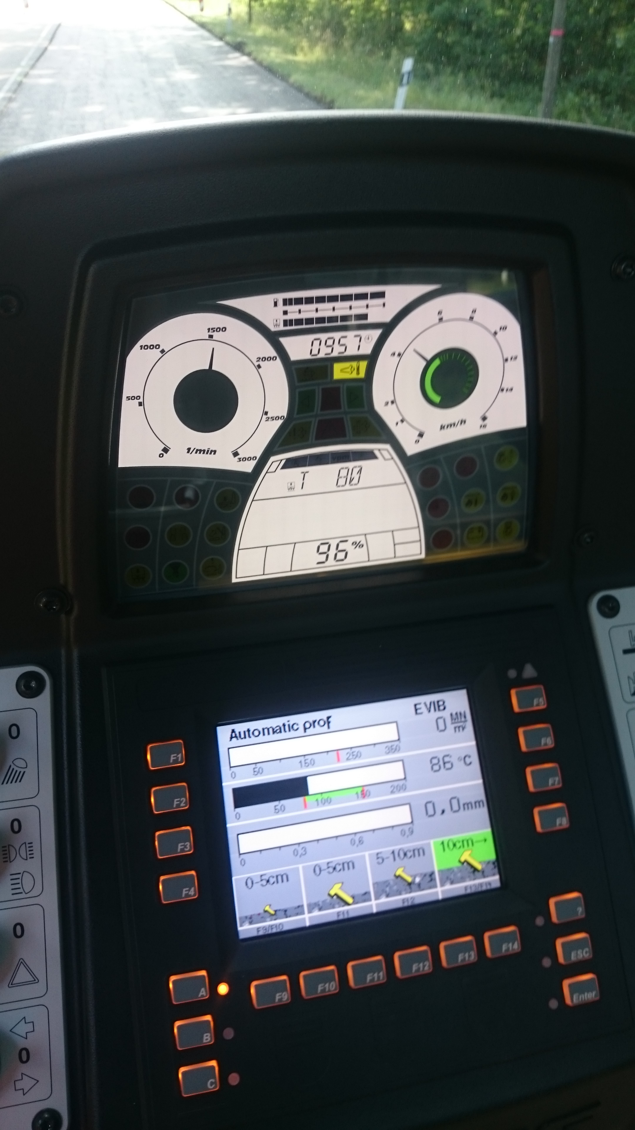 Bedienoberfläche des Asphalt Manager 2 in einer Bomagwalze Typ BW 174 AP-4 AM